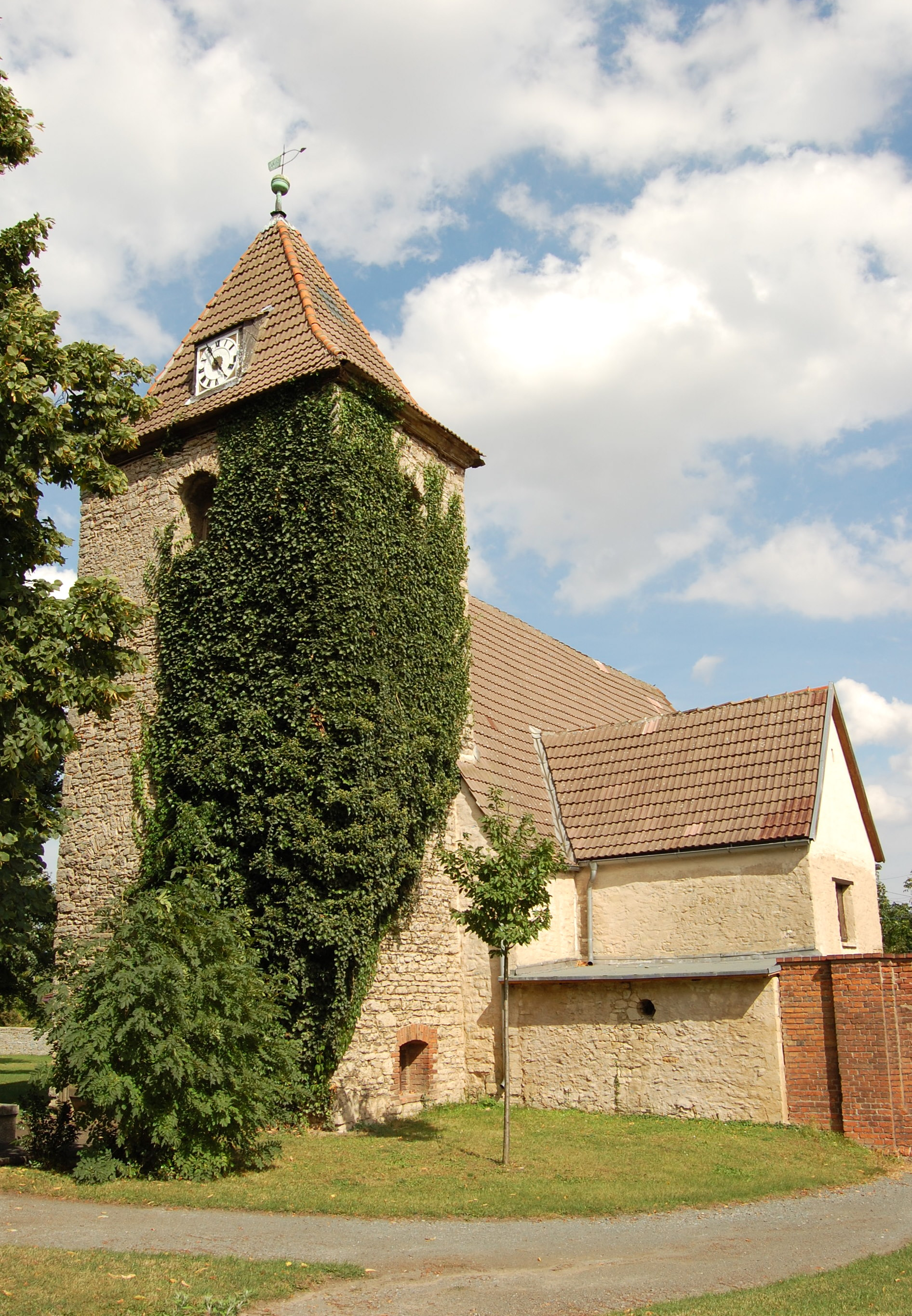 St. Georg Kirche Westdorf